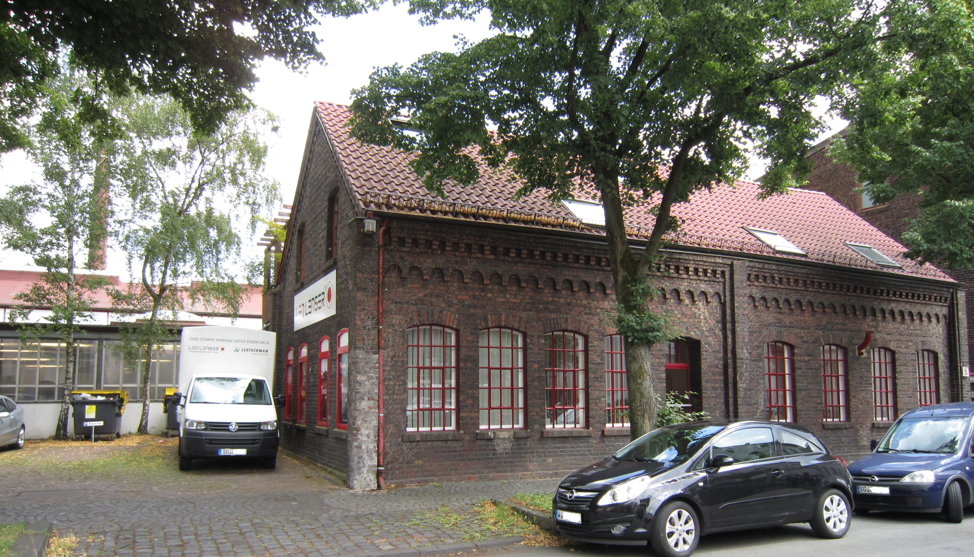 Firmensitz von Zweibrüder in der ehemaligen Mathildenhütte, Kronenstraße 5-7 in Solingen